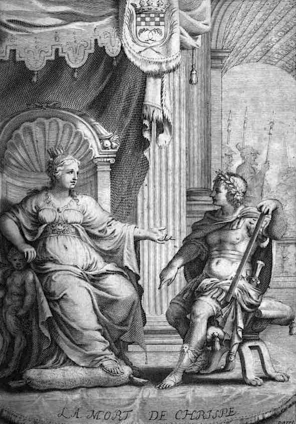 François (dit Tristan) L'Hermite (1601-1655) - La mort de Chrispe, frontispice par Jacques Stella, gravé par Pierre Daret (1645)